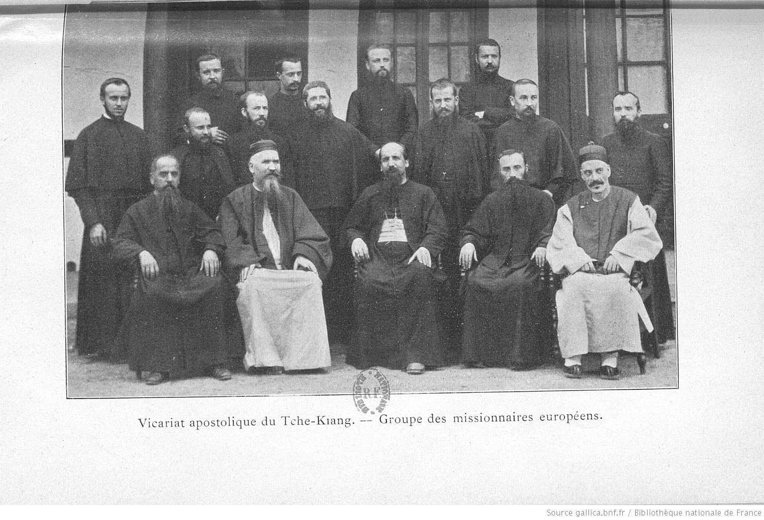 Missionnaires lazaristes français du vicariat apostolique du Tché-Kiang (aujourd'hui diocèse de Ningbo), photographie de l'ouvrage Une autre Chine de Paul-Marie Reynaud C.M., paru en 1897 à Abbeville, édition C. Paillart. Mgr Reynaud est assis au milieu.